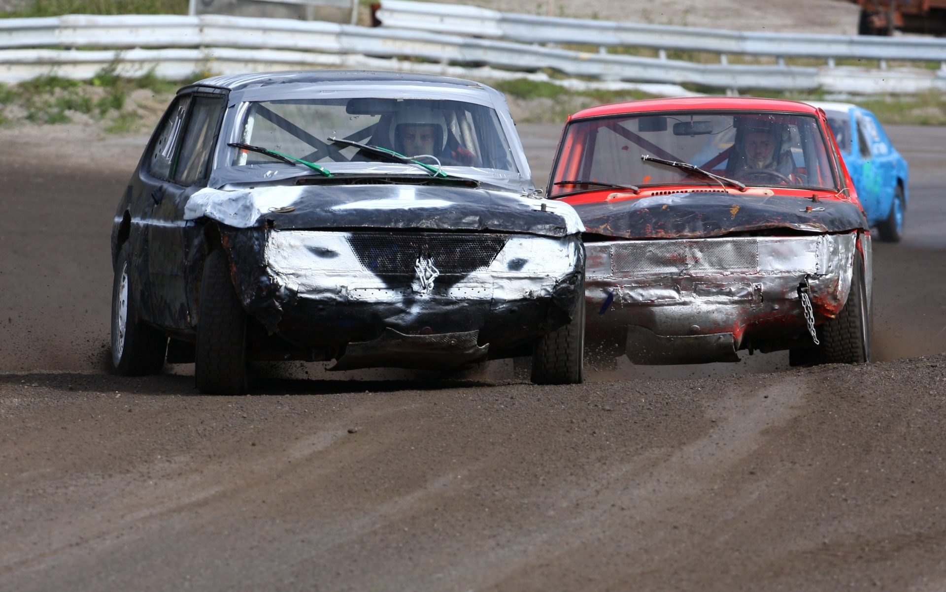 FGolkrace Saab